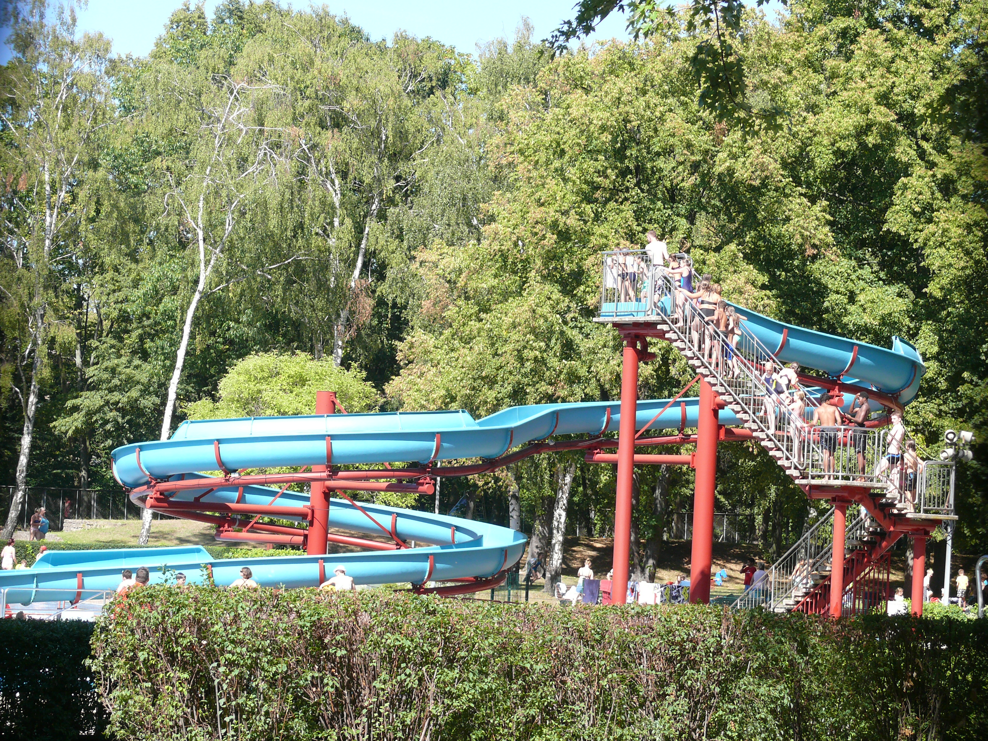 Berlin-Gesundbrunnen Freibad Humboldthain Rutsche